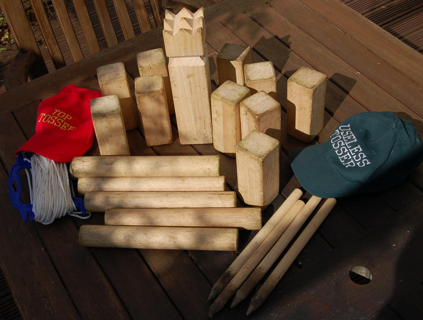 Neil Wilson